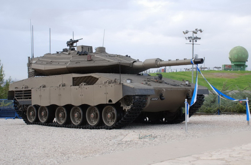 Israeli tank Merkava Mk4